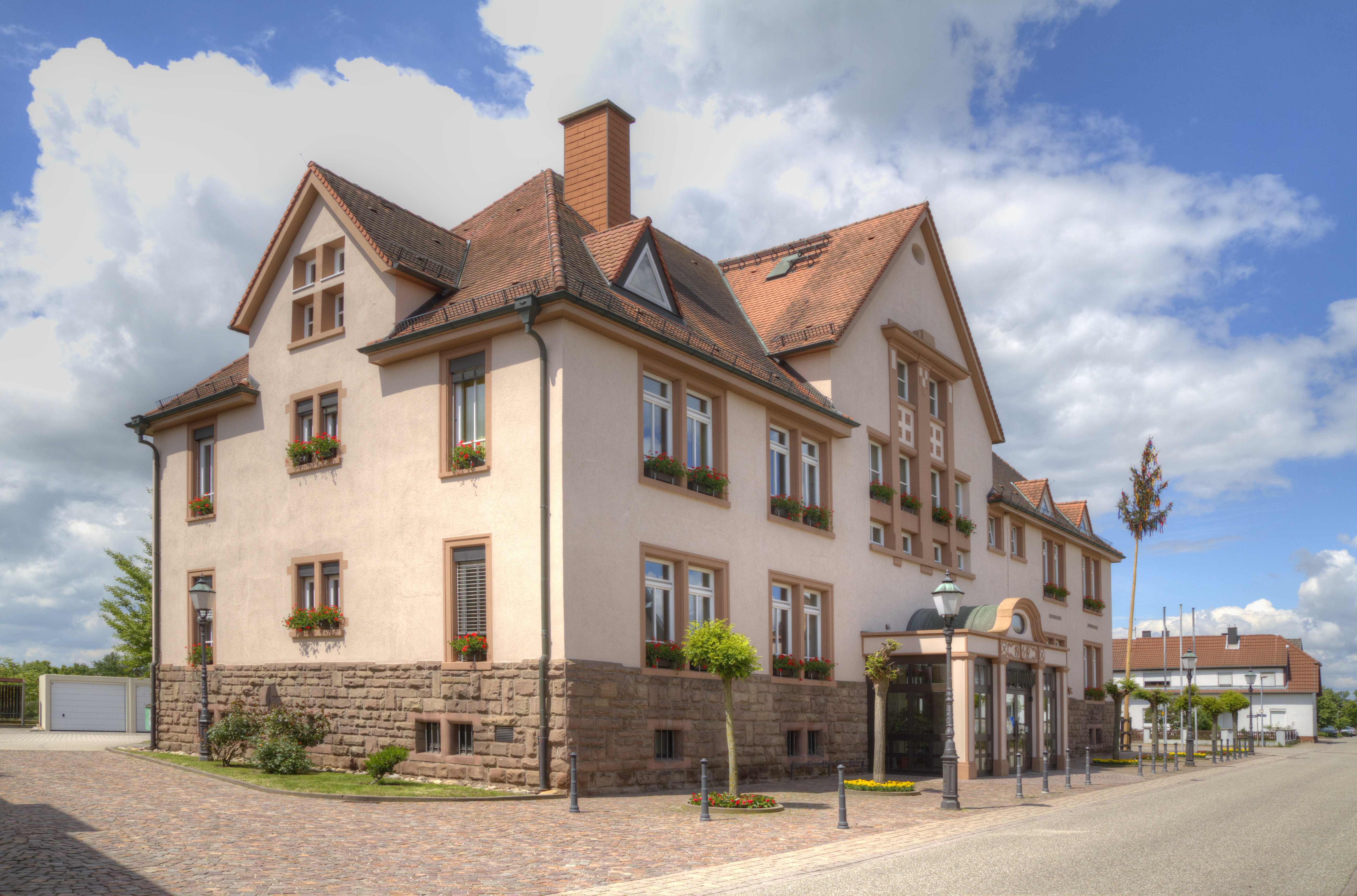 Das 1912 erbaute Bietigheimer Rathaus.